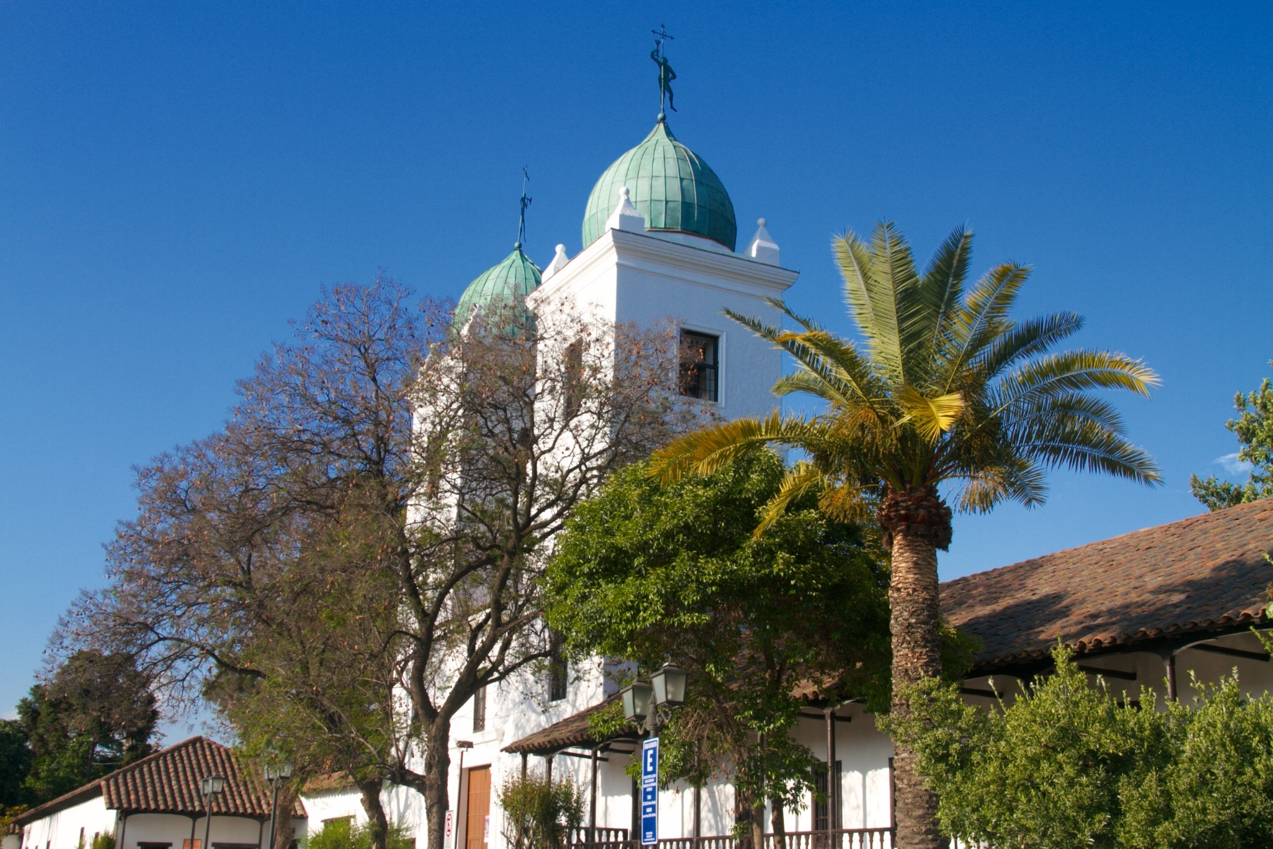 Pueblito Los Domínicos 47